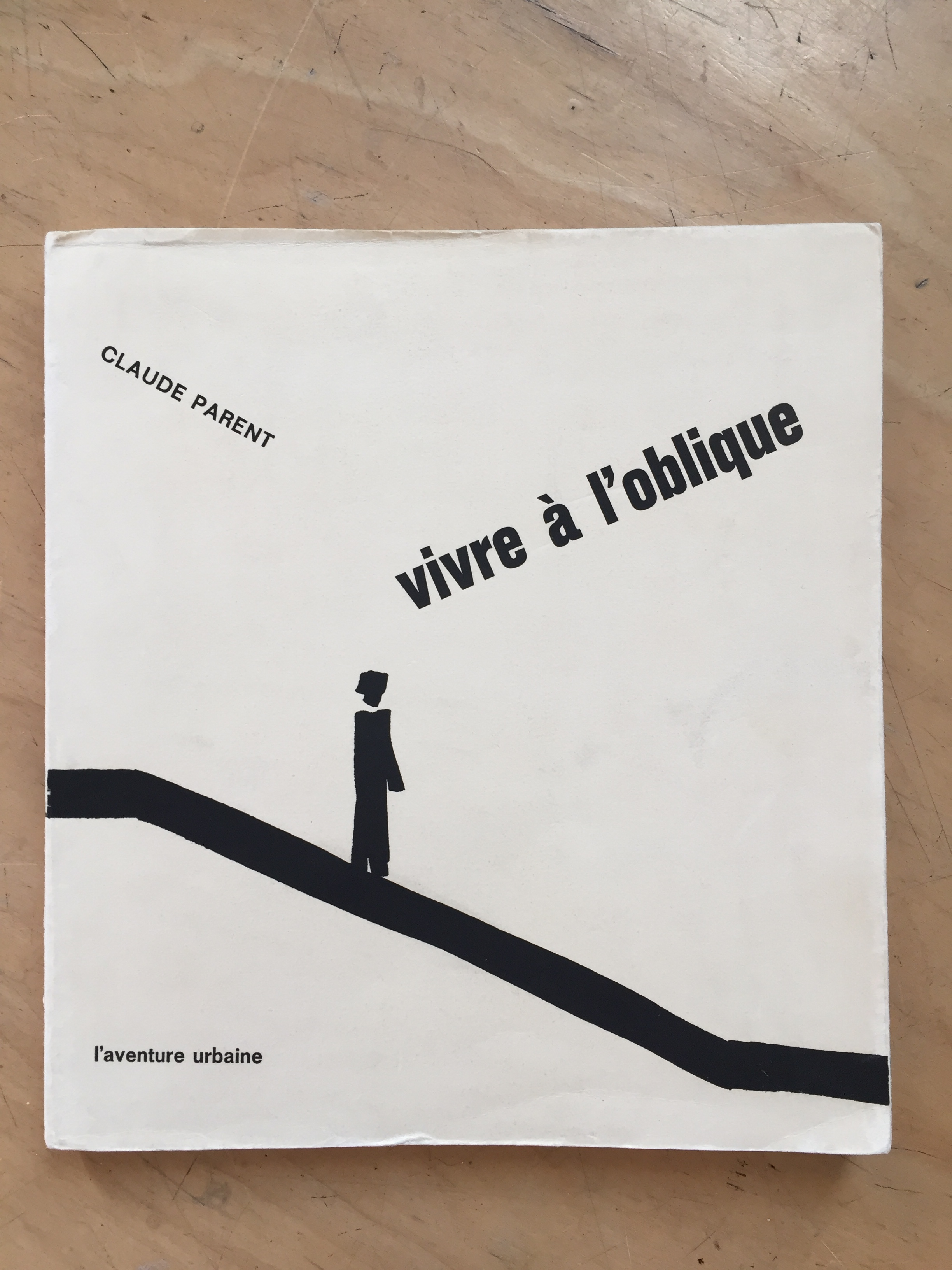 Edition originale de 1970 du livre "Vivre à l'Oblique" par Claude Parent